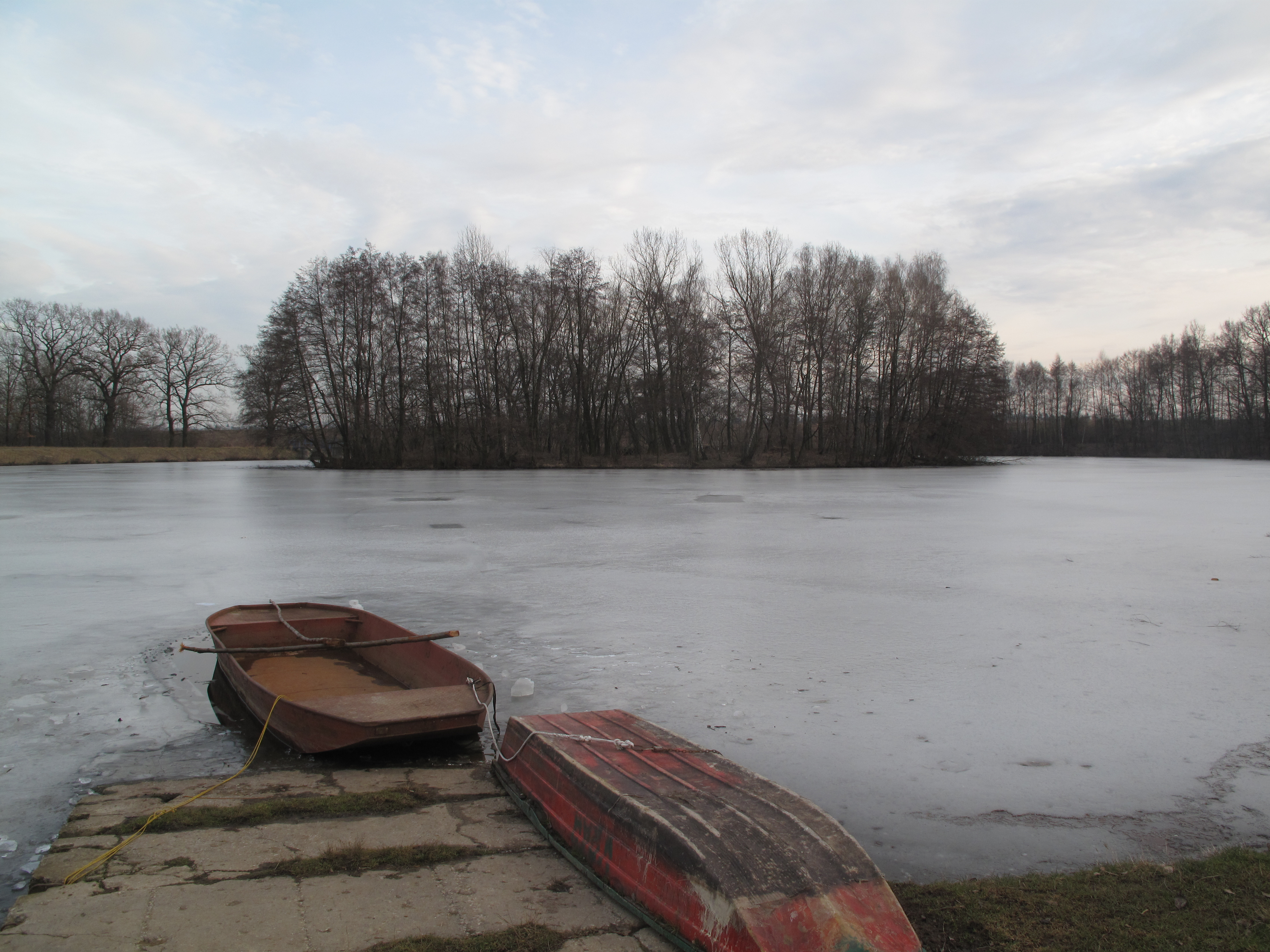 Rybník Vrah